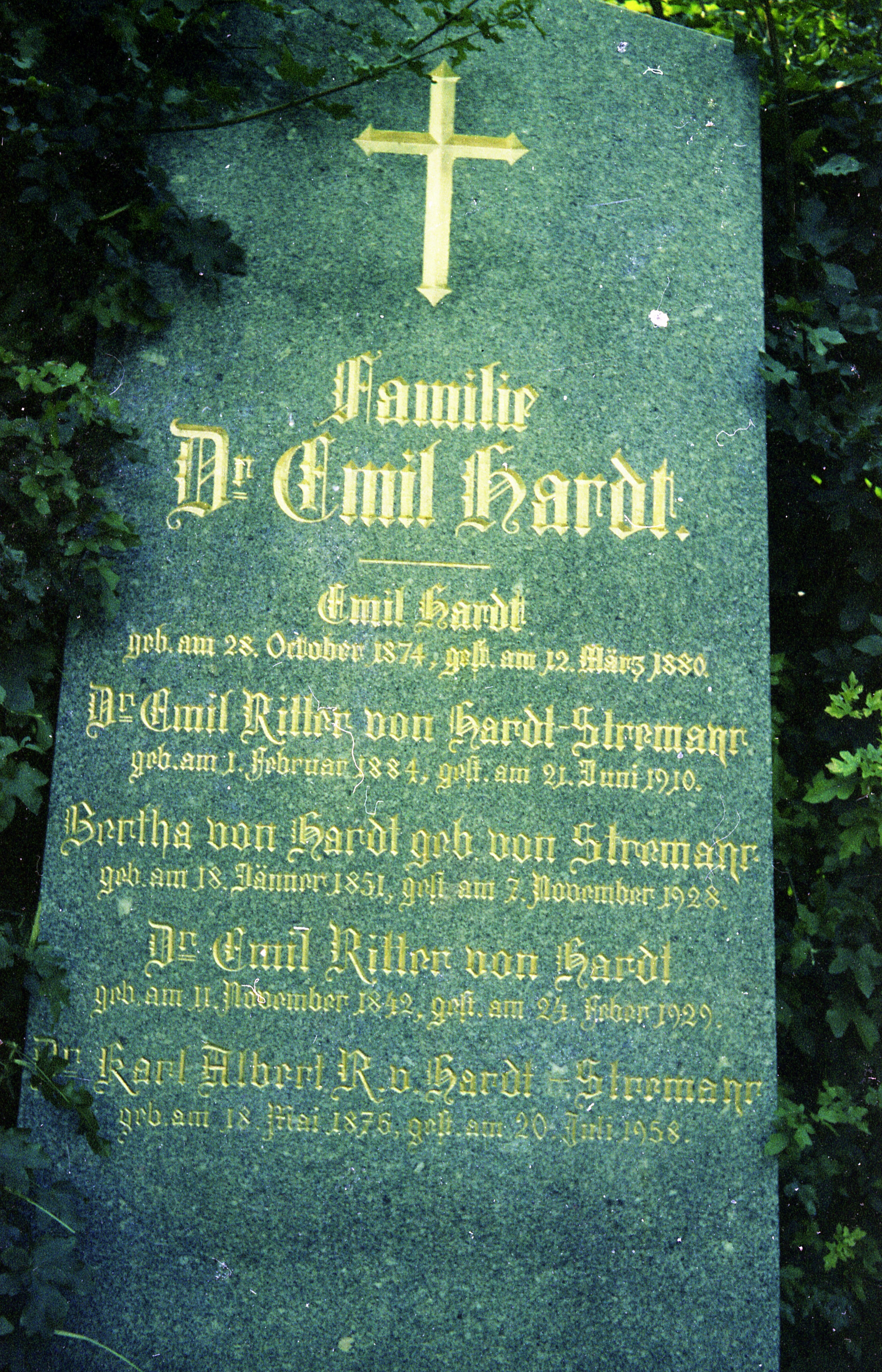 Hernals_Gruppe LK_Reihe GG_1